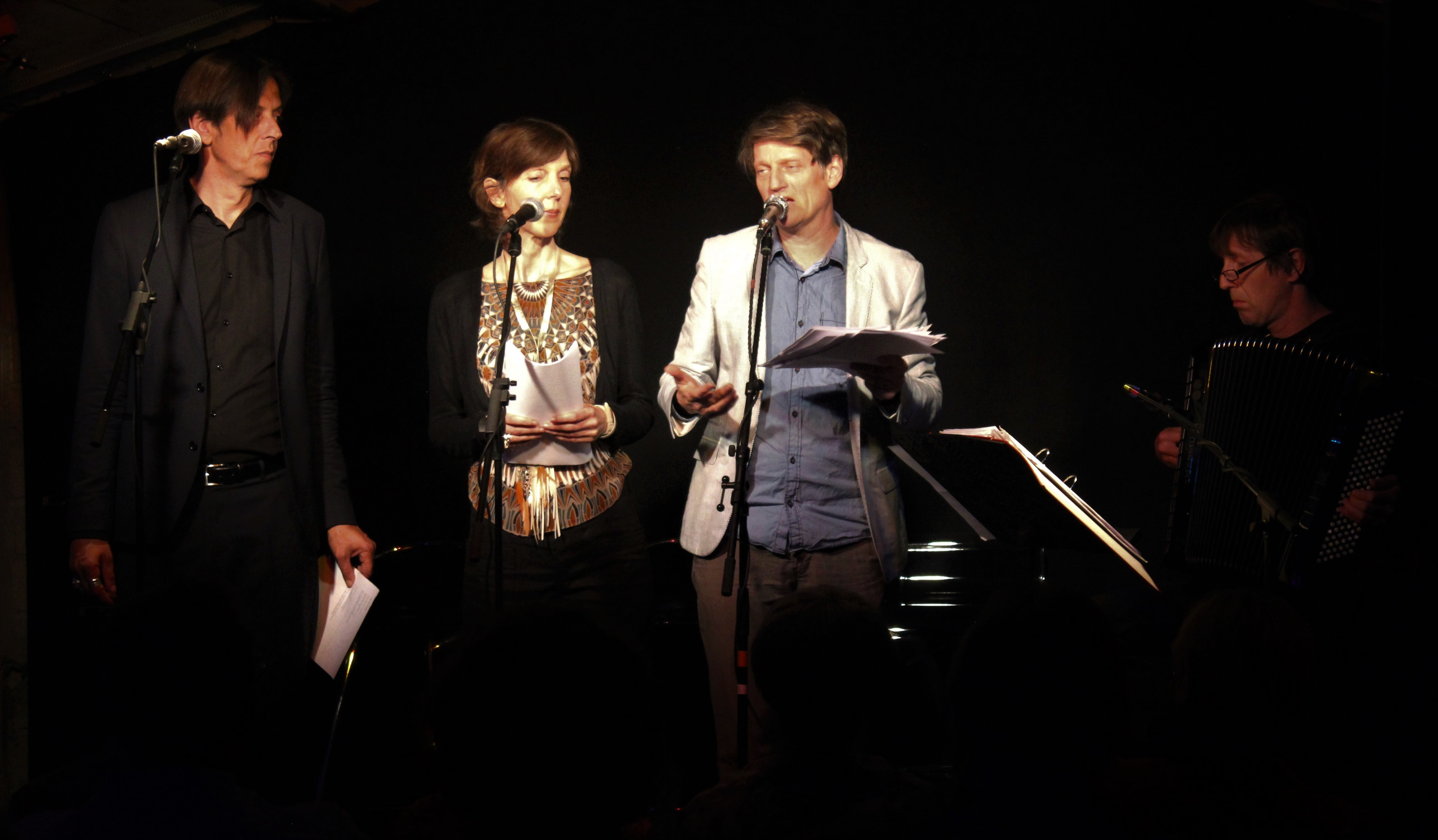 Lesung der Autorengruppe "Bern ist überall": Pedro Lenz, Laurence Boissier, Gerhard Meister und Akkordeonist Adi Blum.